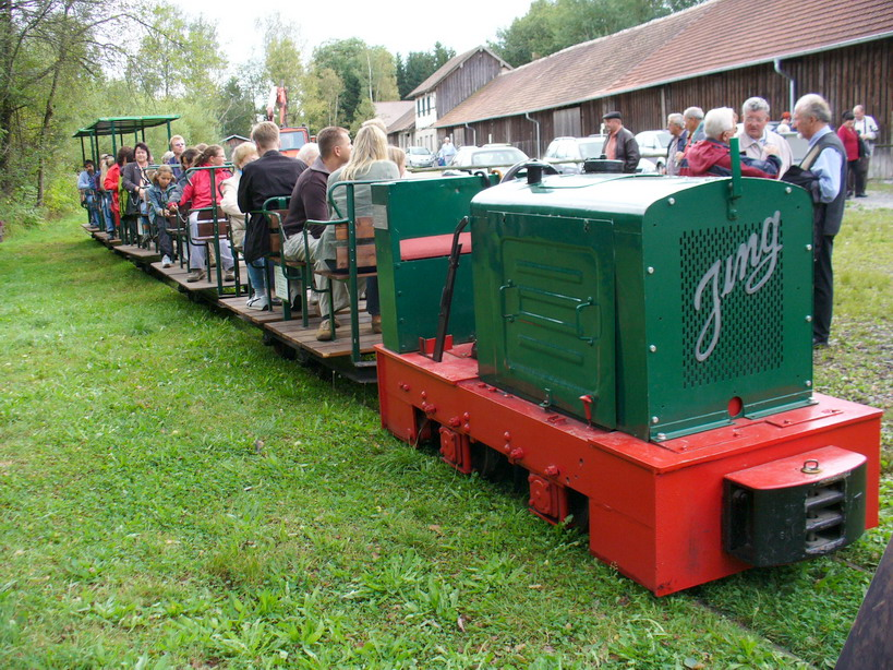 Torfbahn Bad Wurzach, Wurzacher Ried, Zeiler Torfwer, kam Oberschwäbischen Torfmuseum